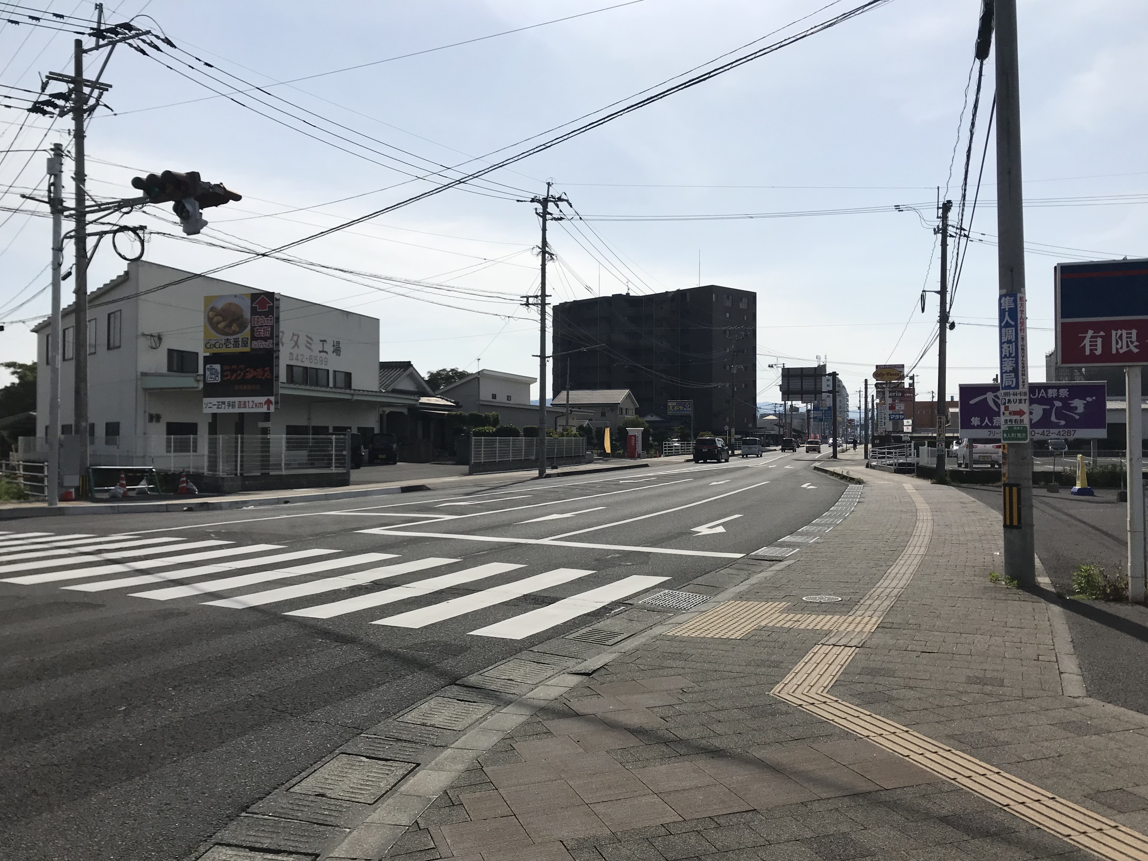 隼人塚付近の鹿児島県道471号